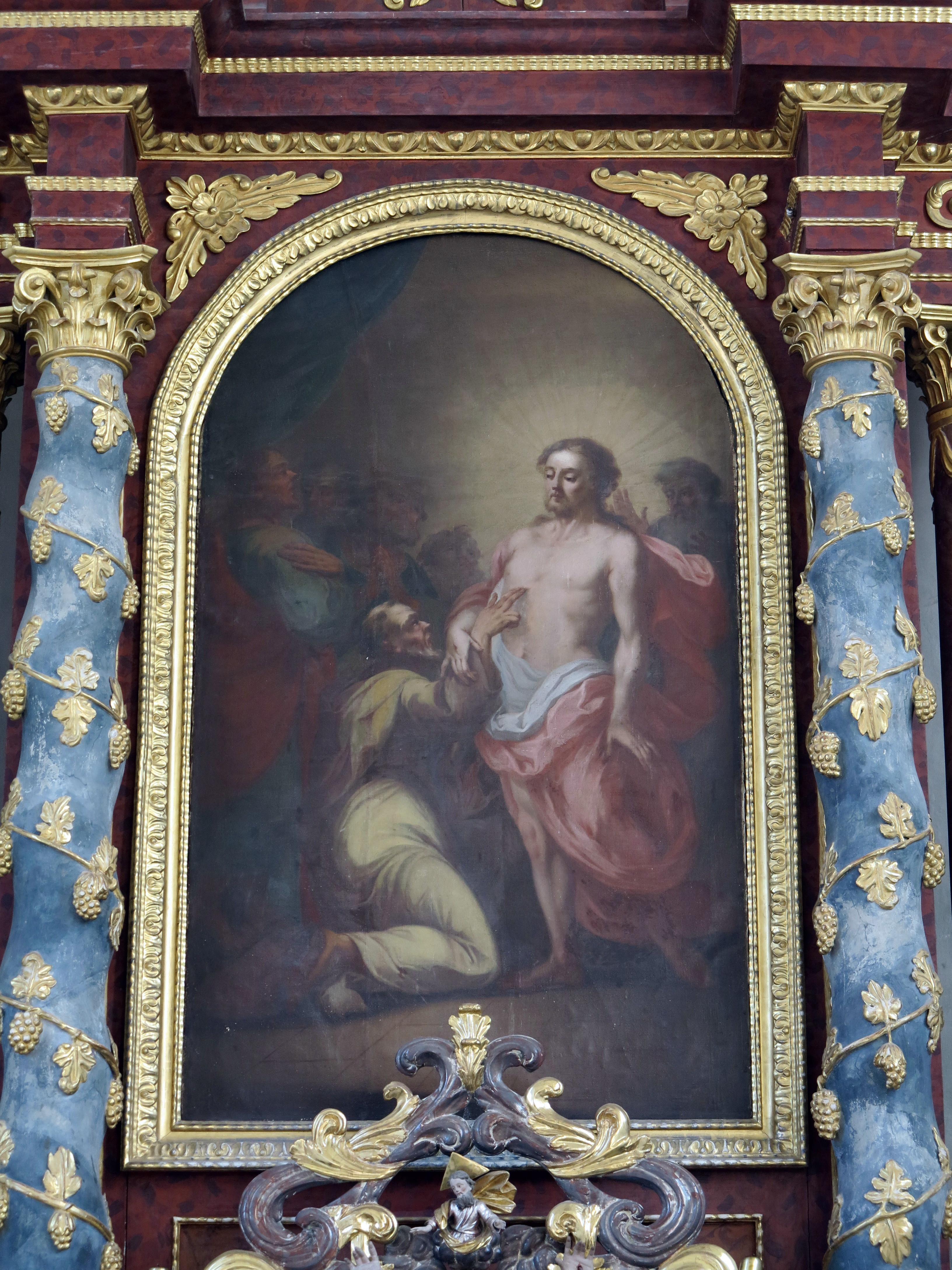 Das Bild wurde von Josef Mair, Elbigenalp, als Werk Kellers identifiziert.